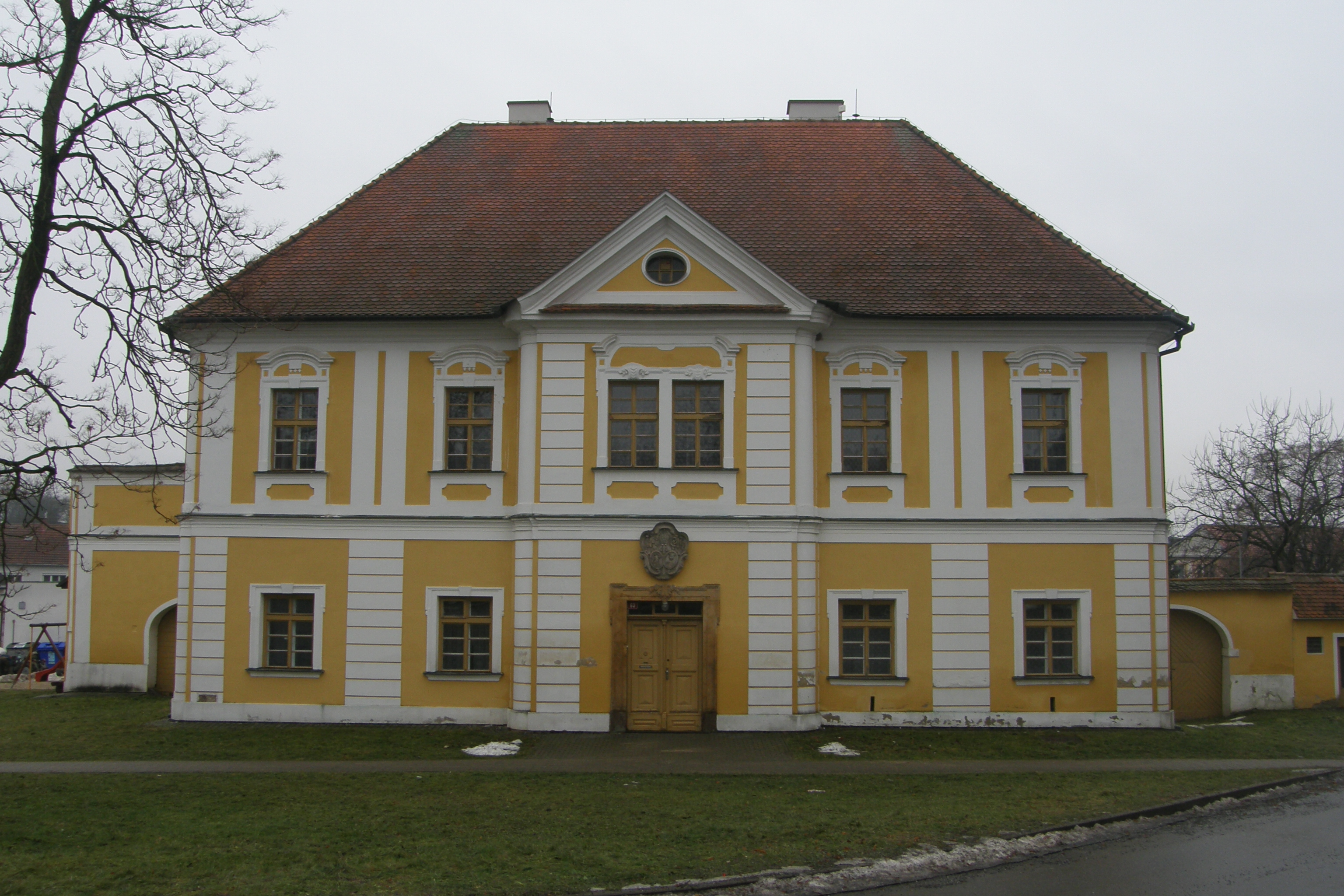 Fara v Cetkovicích